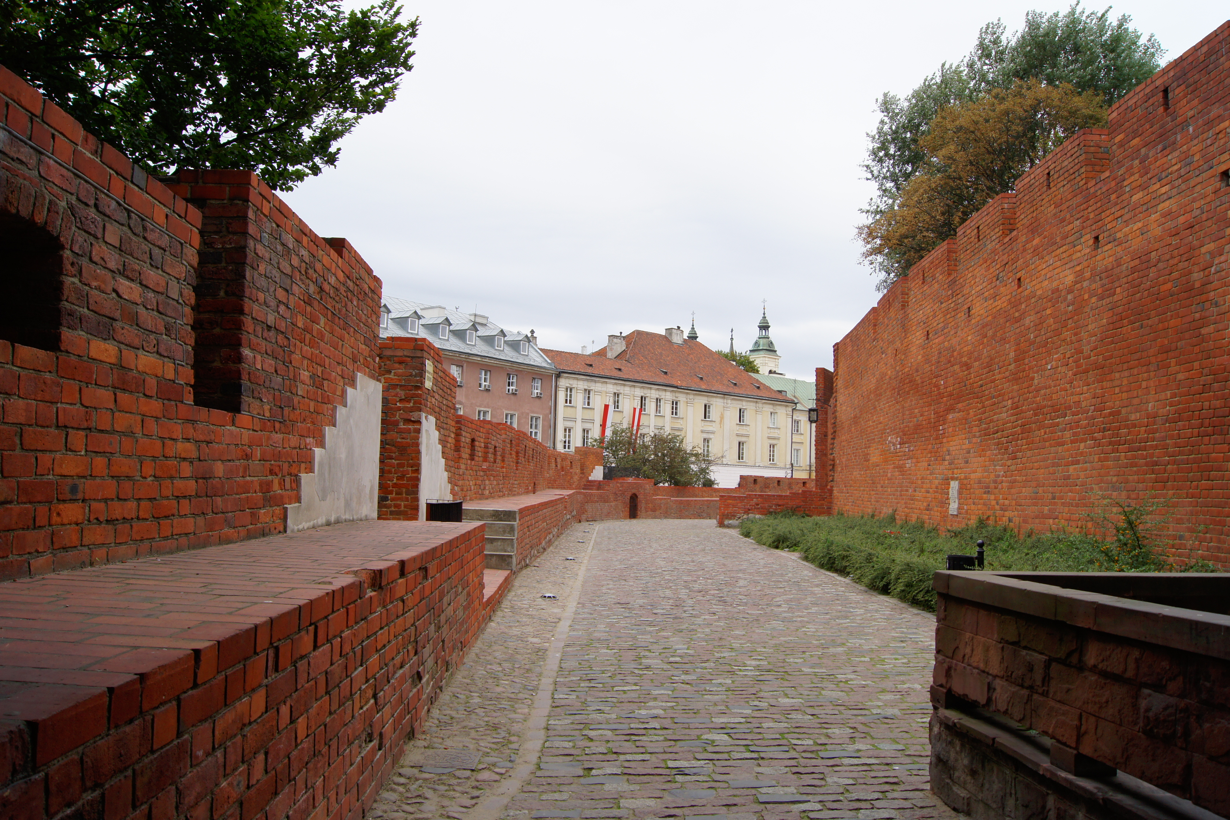 mury obronne Starego Miasta, ul. Podwale, Warszawa, dz. Śródmieście, widok na ulicę Podwale